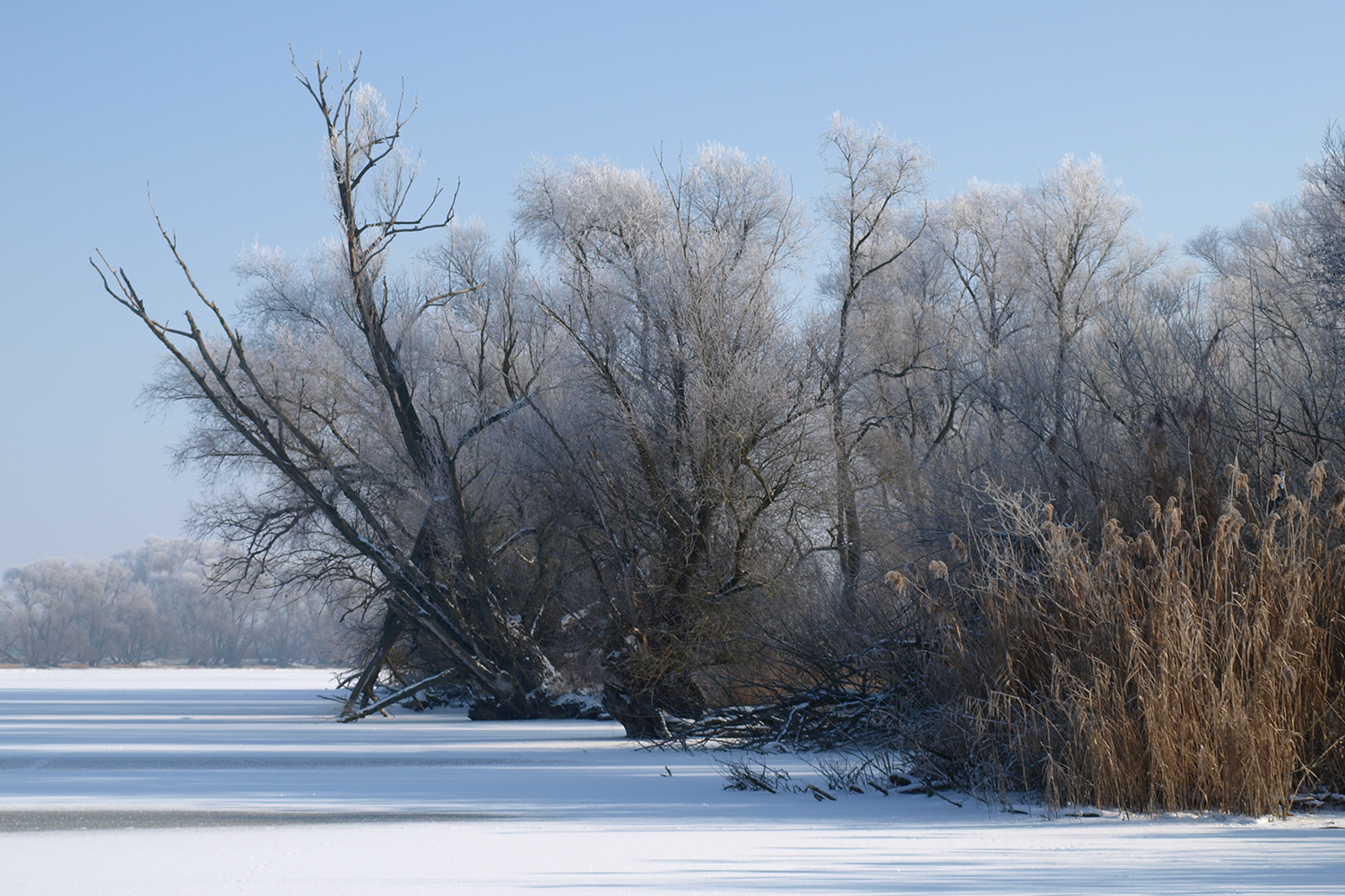 Naturschutzgebiet „Öberauer Schleife“ (NSG 00288.01), Bayern